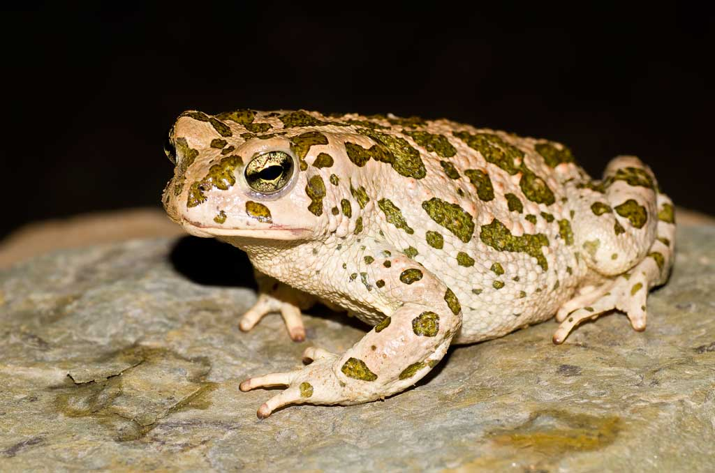 Pseudepidalea boulengeri fotografiado en el erg de Ouzina (Marruecos) el 1 de abril de 2012